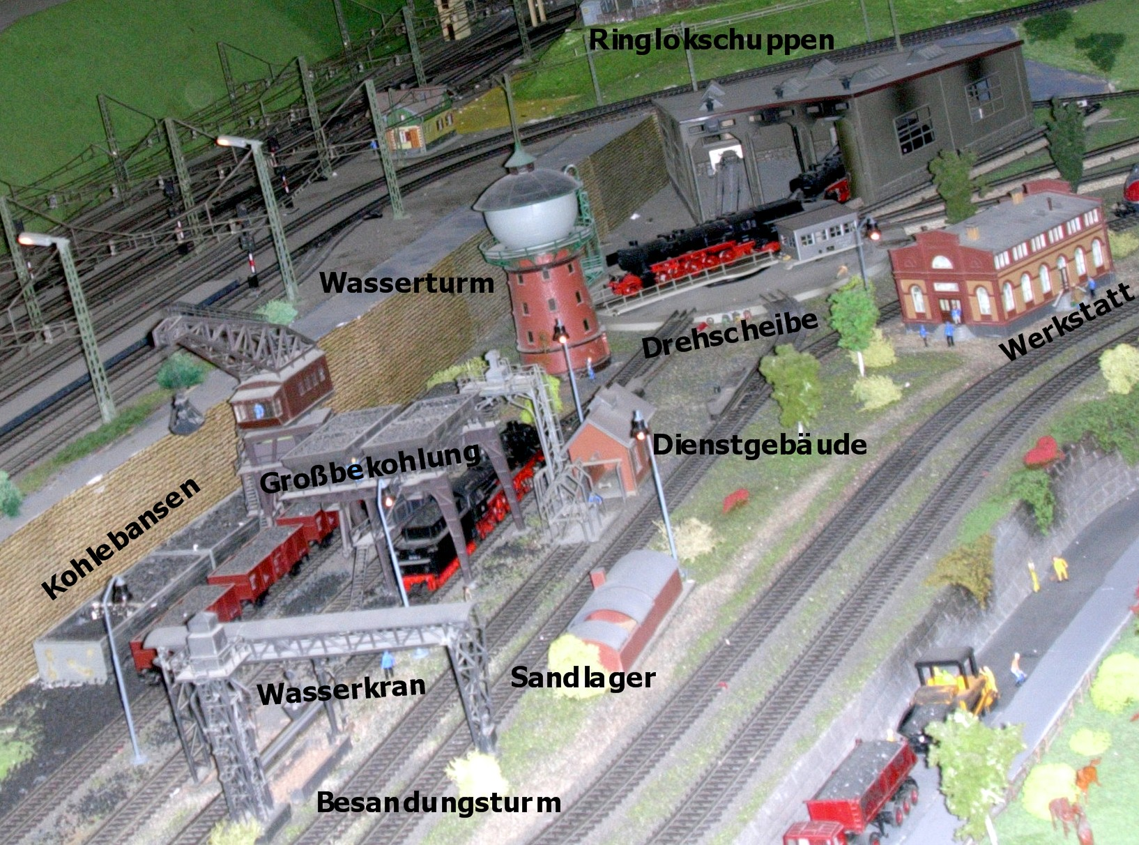 Model of a Bahnbetriebswerk